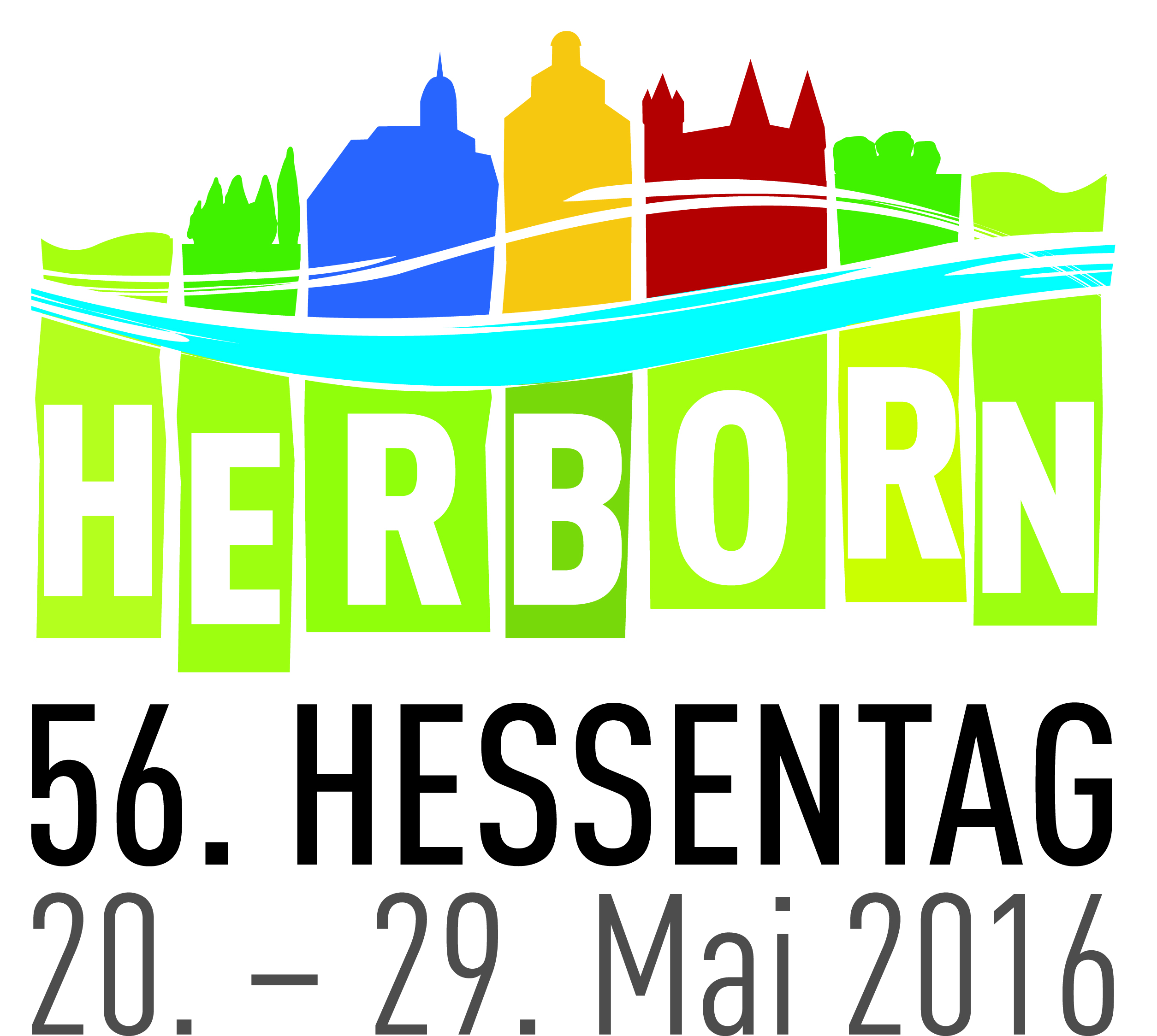 Das offizielle Logo des Hessentages 2016 in Herborn